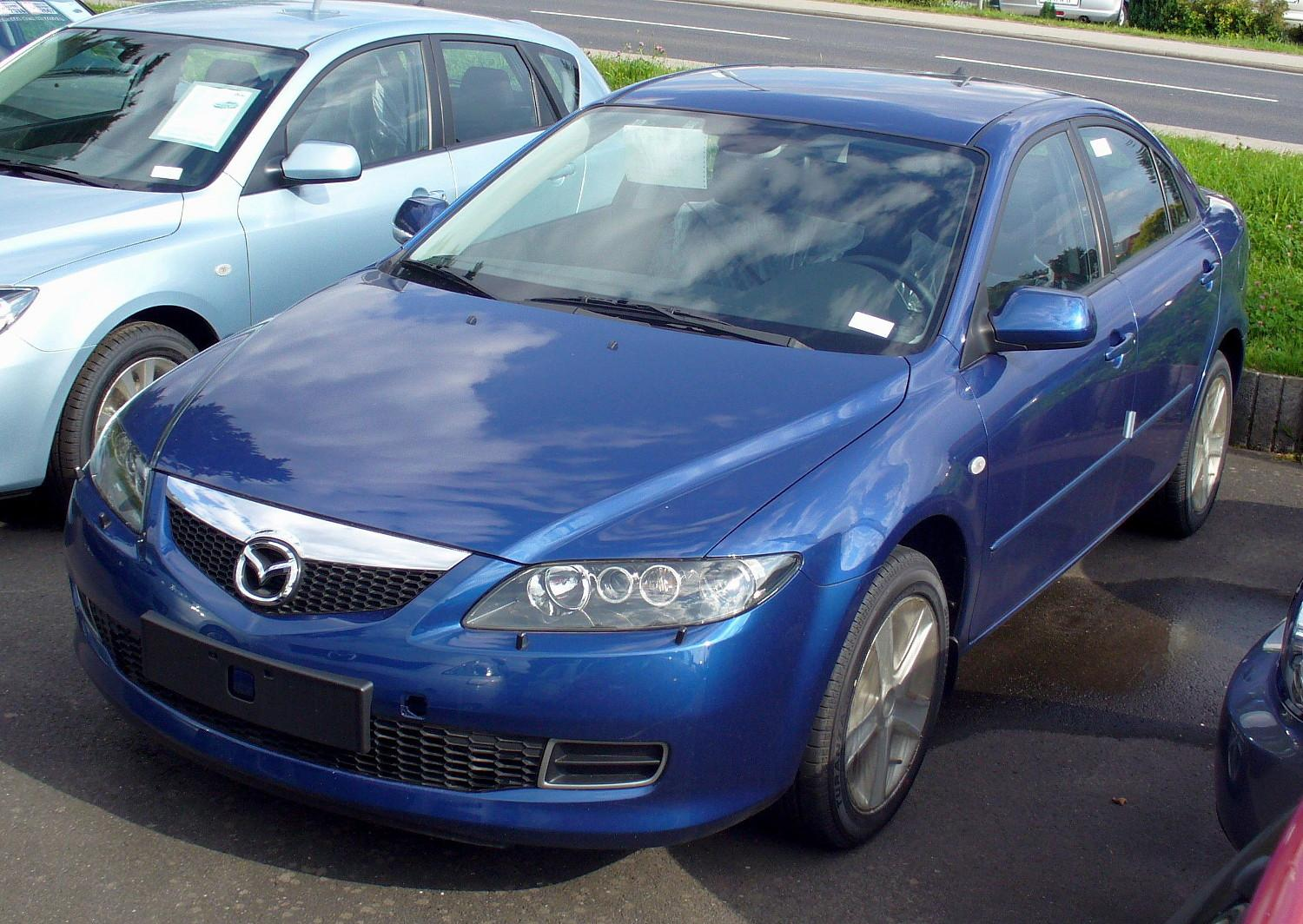 Mazda6 Sedan